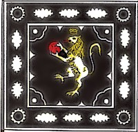 Bandiera della magistratura dei Leoni del Gioco del Ponte di Pisa